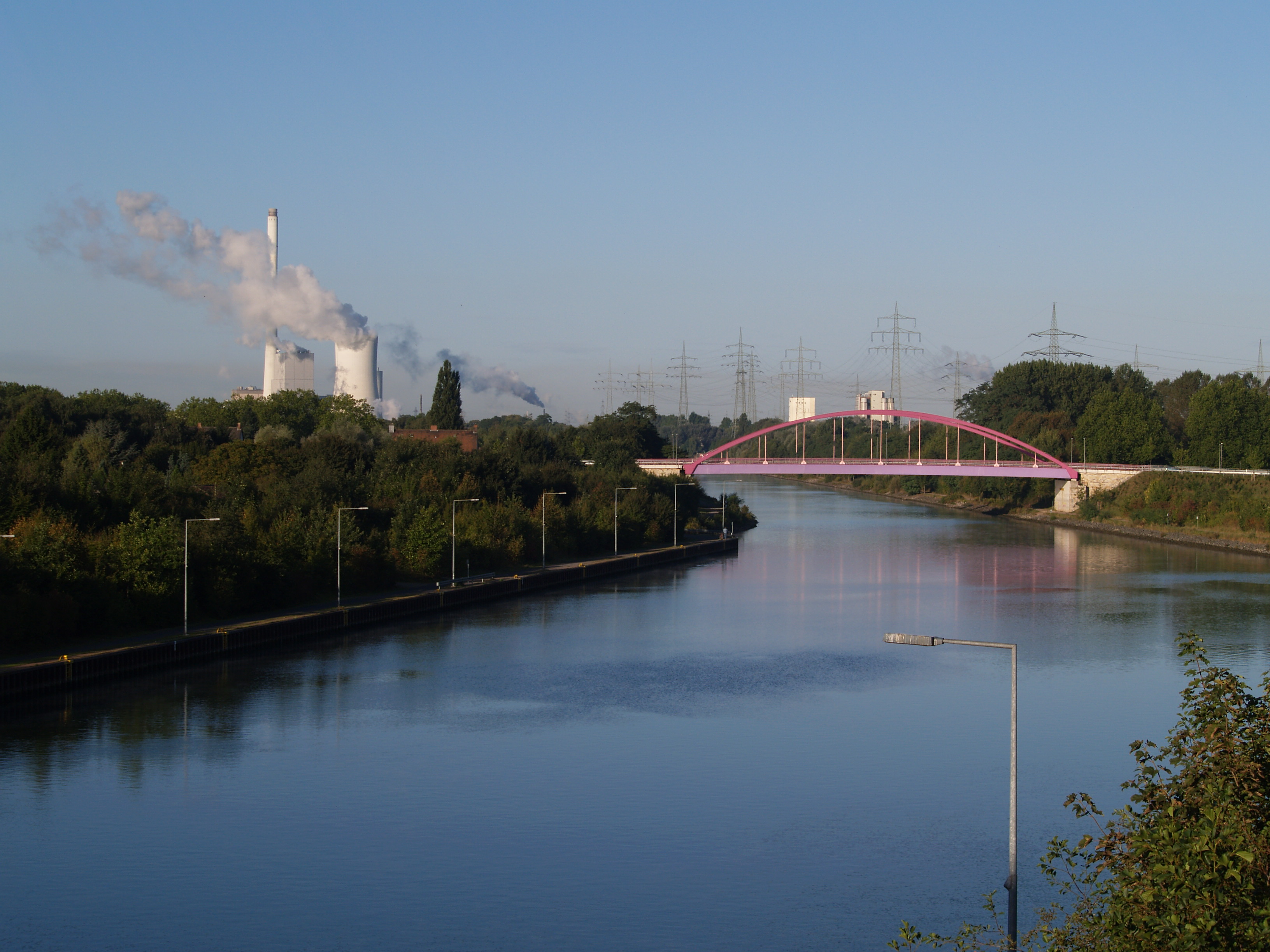 Rhein-Herne-Kanal, Schleuse Herne-Ost, Unterwasser von der Schleuse aus gesehen